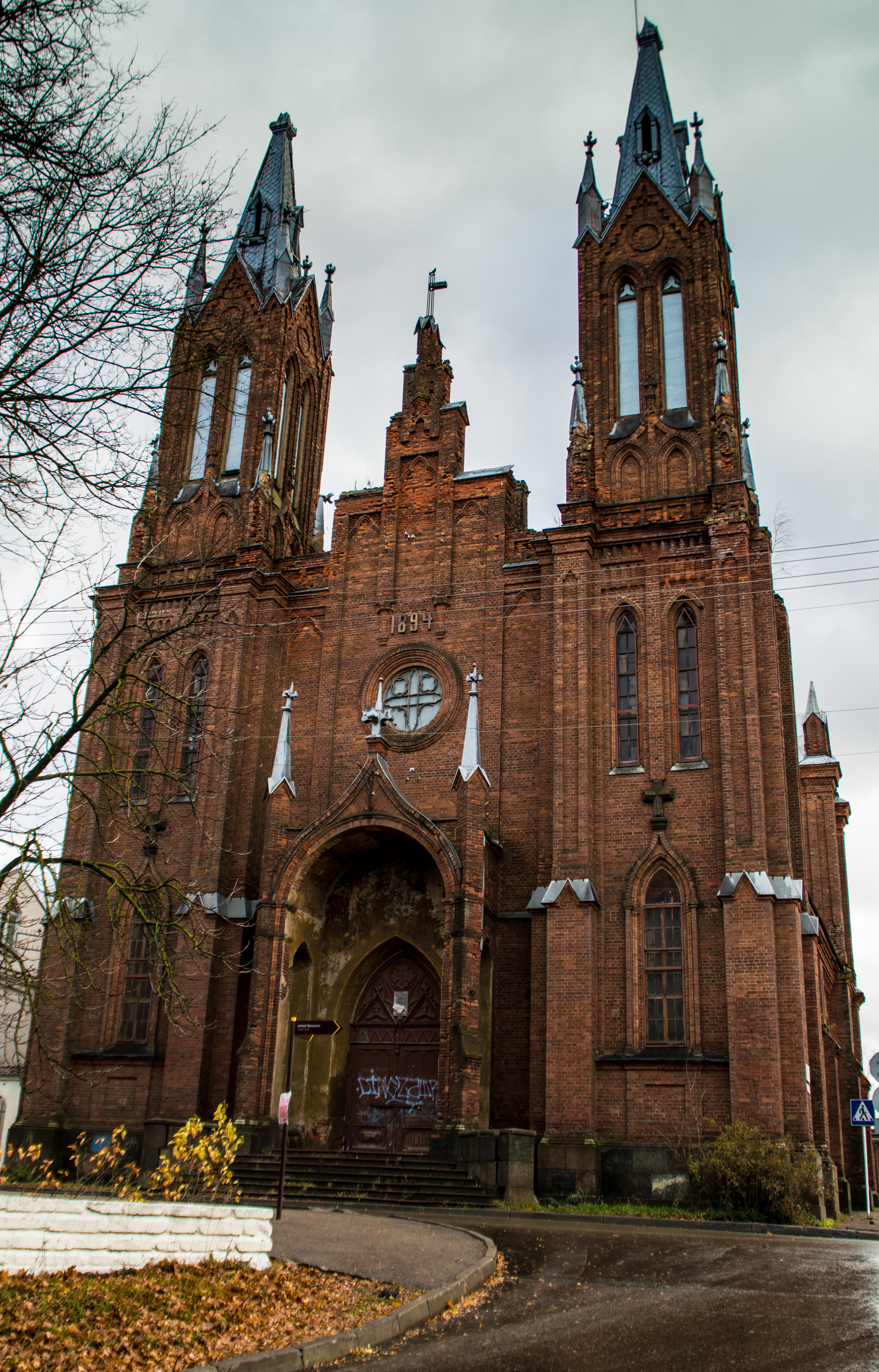 Польский костел (Смоленская область, Смоленск, улица Урицкого, 8)